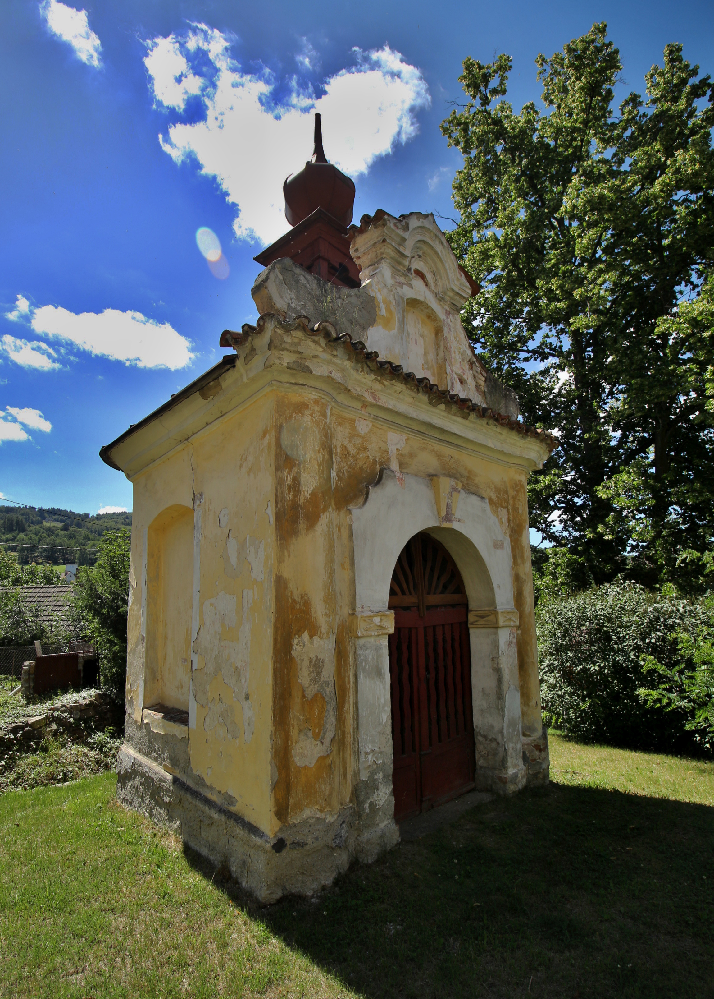 Jetřichovice, kaple sv. Jana Nepomuckého